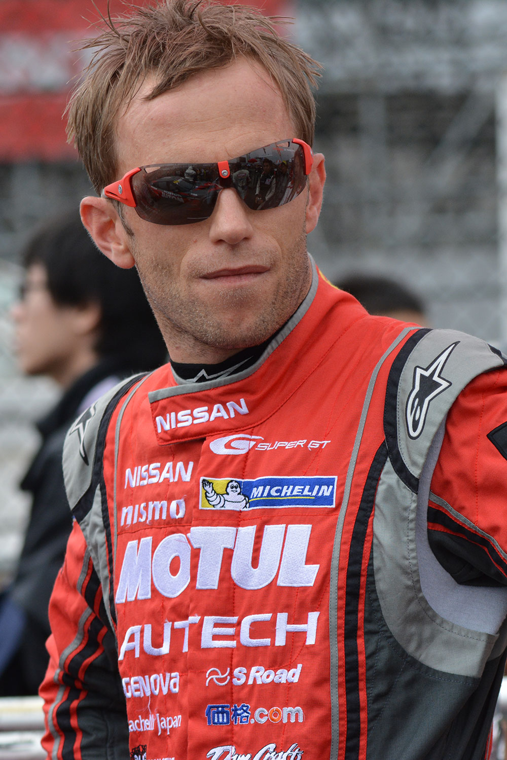 ロニー・クインタレッリ